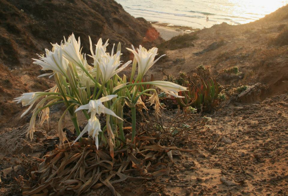 חבצלת החוף_על_רכס_הכורכר הצפון-מערבי של תל אביב - יפו